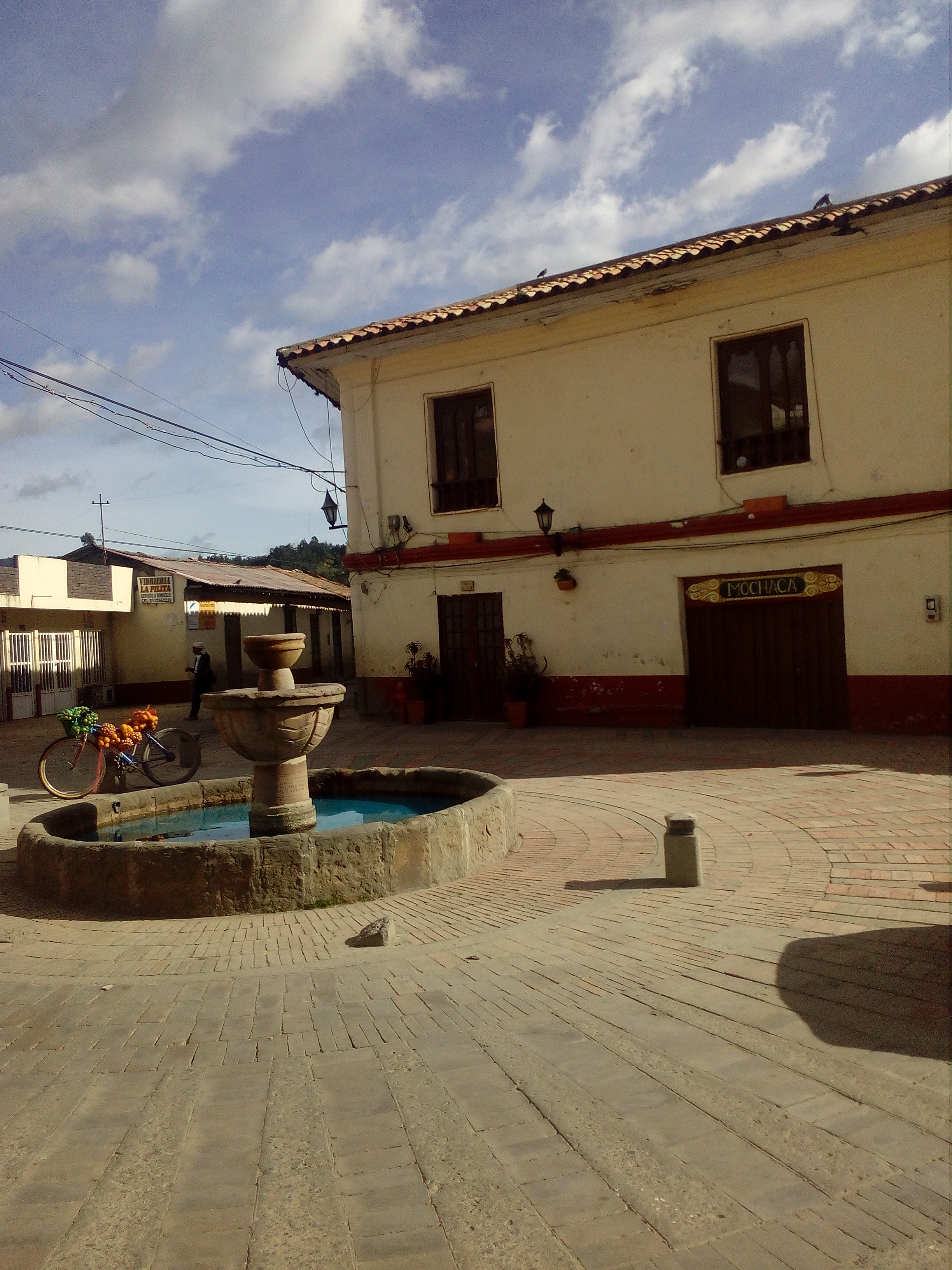 Centro historico de Sogamoso